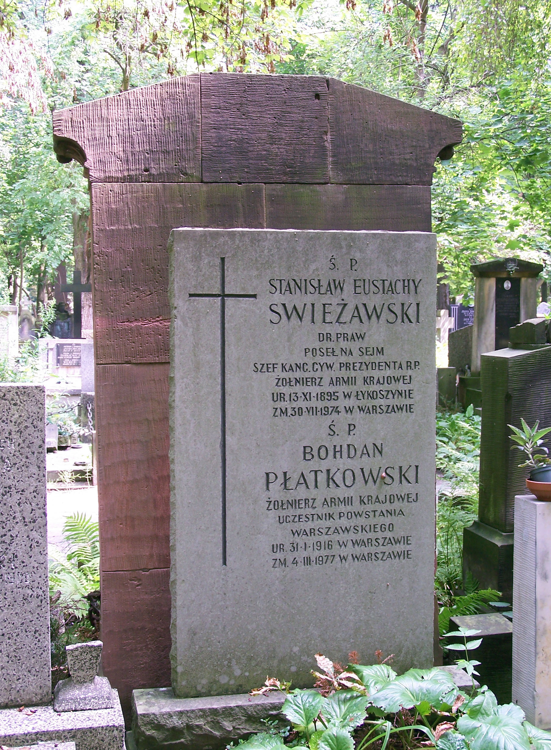 Grave of politician Stanisław Eustachy Swieżawski at Powązki Cemetery in Warsaw, Poland